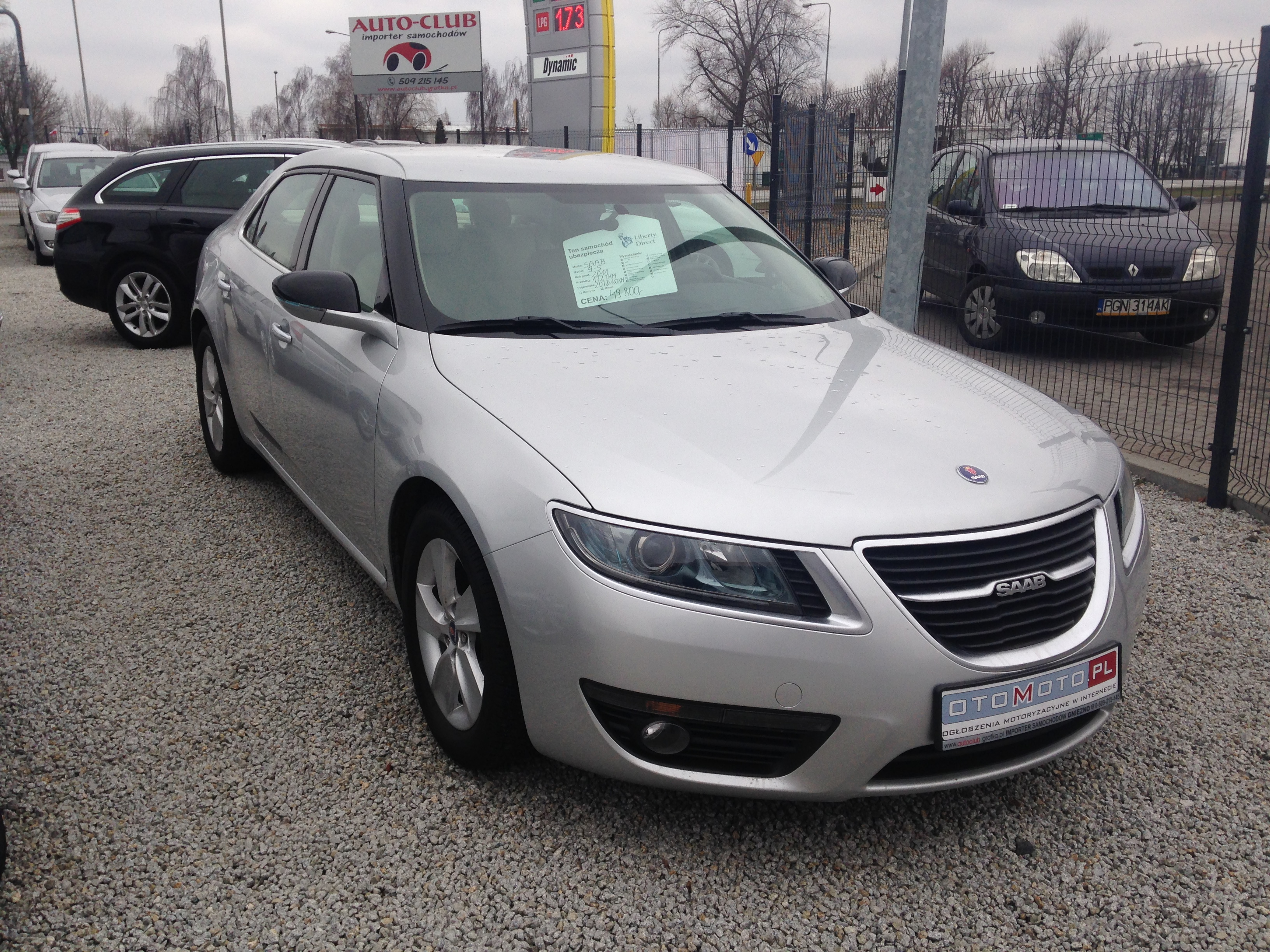 Saab 9-5 NG 2011